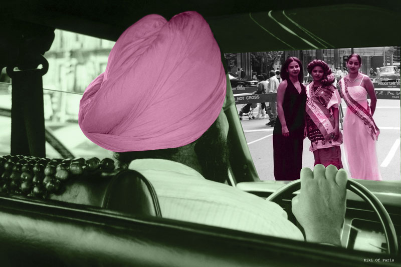 Séquence polymorphe, réalisée en 1988 à New York à partir de deux clichés : Défilé des Miss d’Amérique Latine à Manhattan et un Chauffeur de taxi d’origine indienne Composition réalisée à partir des conseils amicaux du metteur en scène américain Joseph Losey, les miss et le chauffeur de taxi semblent observer le photographe Kiki of Paris, dans un triangle parfait. Les séquences polymorphes sont des montages-collages réalisés uniquement à partir des photographies prises par Kiki of Paris.